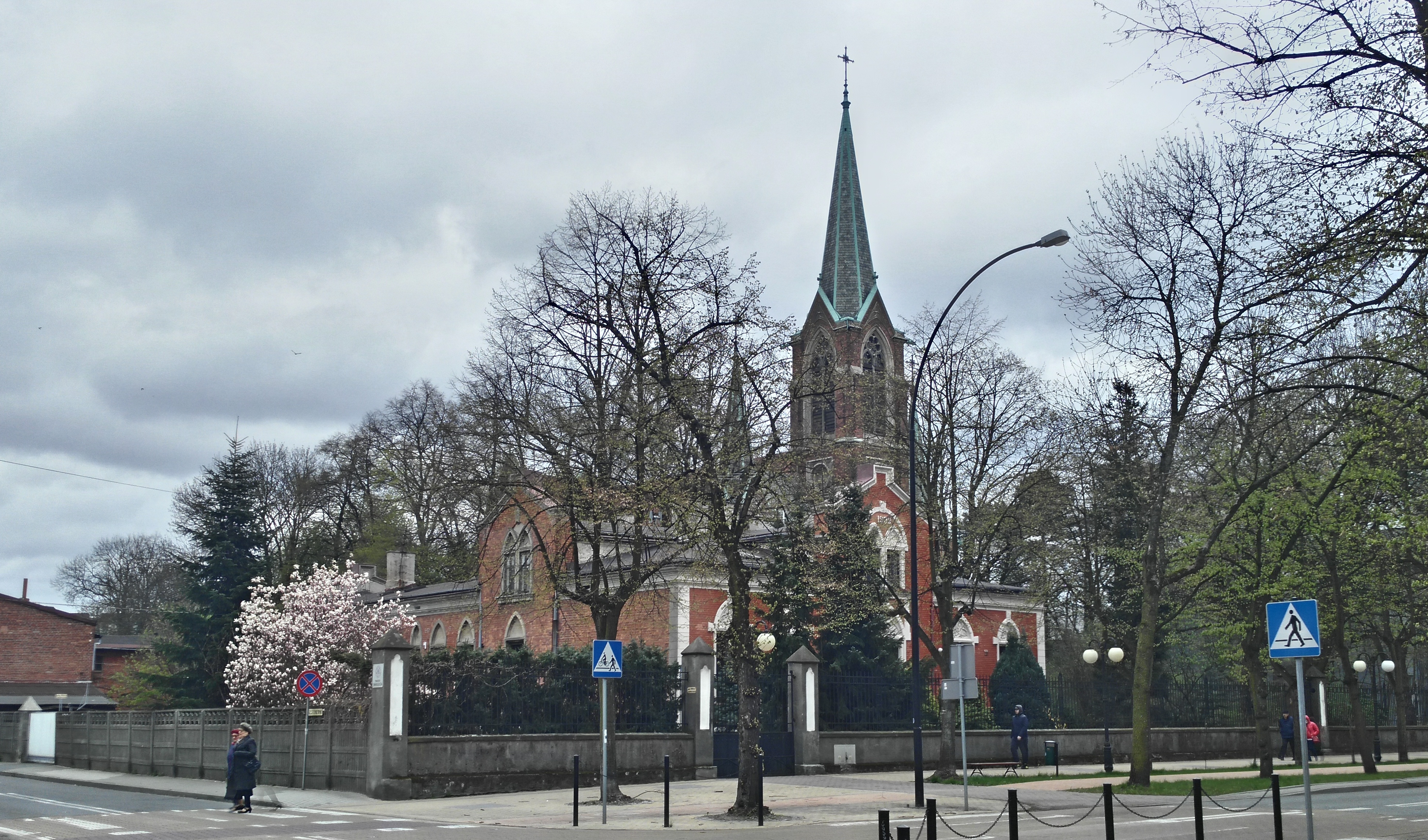 Parafia Ewangelicko-Augsburska w Tomaszowie Mazowieckim. Neogotycki kościół z 1902 roku